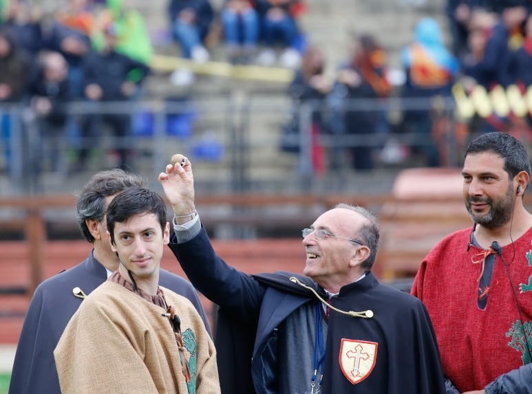 Sorteggio corsa ippica del Palio di Legnano 2016